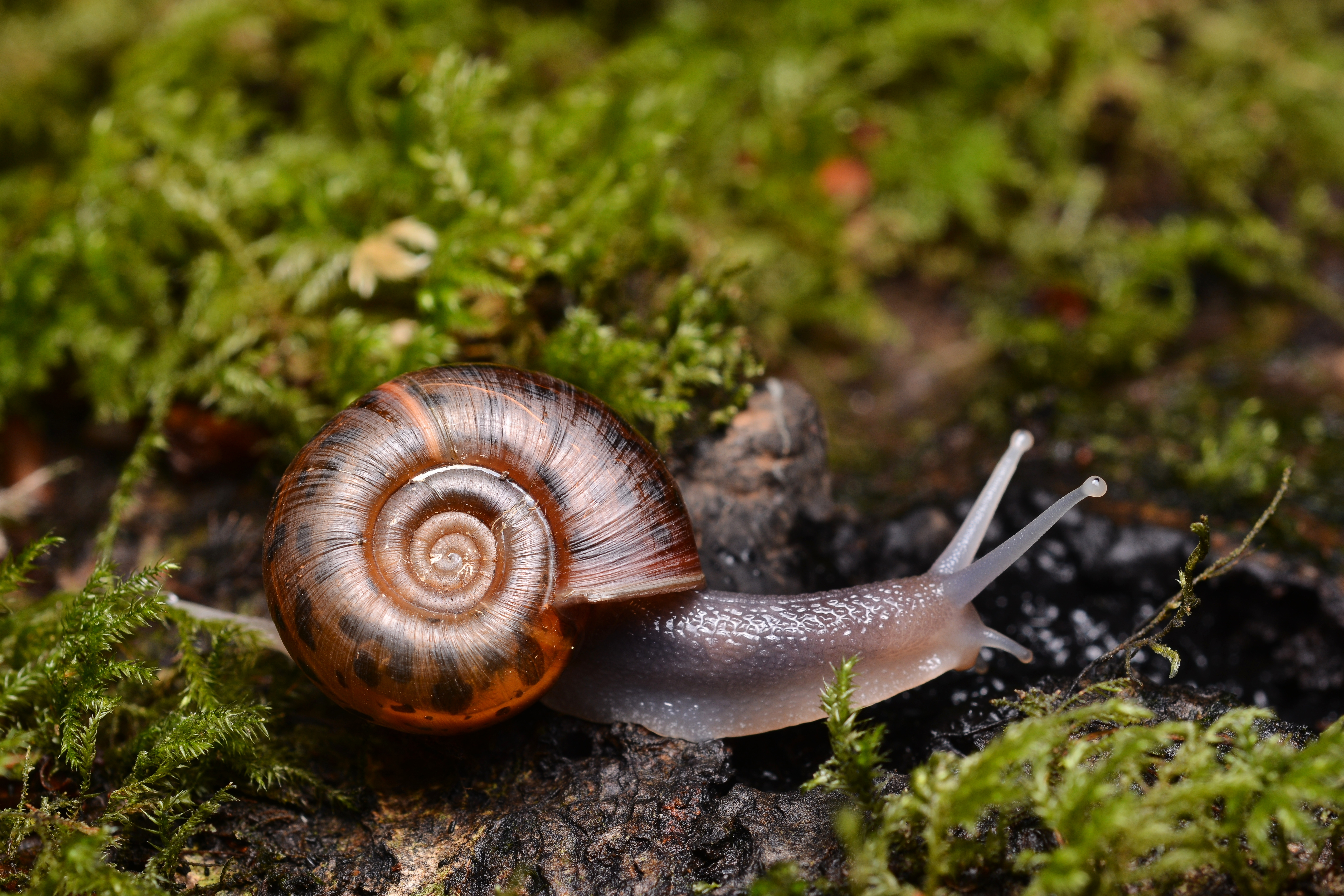 Elona quimperiana - Escargot de Quimper - Quimper snail Location : France - Bretagne - Les Forges des salles Natura 2000 snail species